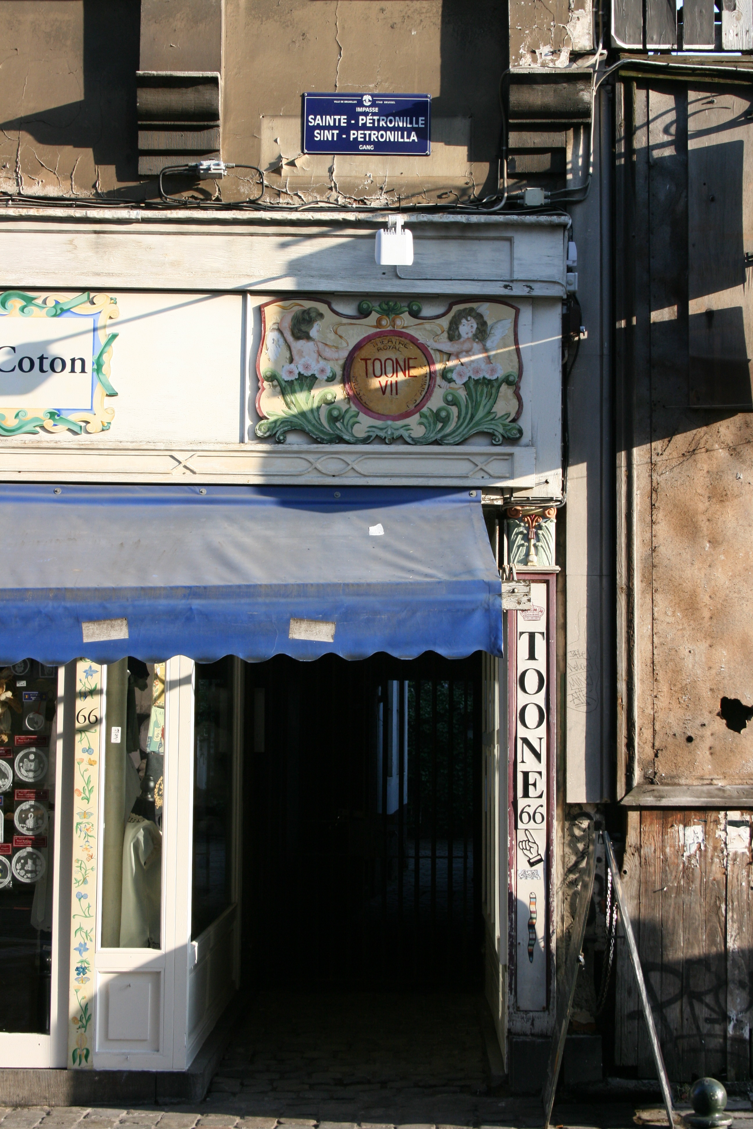 Impasse Sainte-Pétronille, débouchant rue du Marché aux Herbes, Bruxelles, Belgique